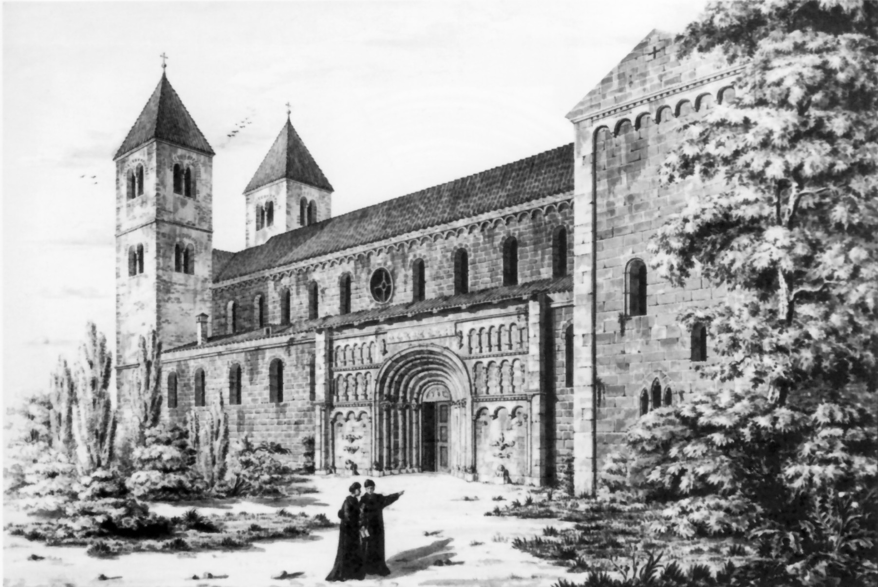 St. Jakob (Schottenkirche), Regensburg, view from northwest. Watercolor.